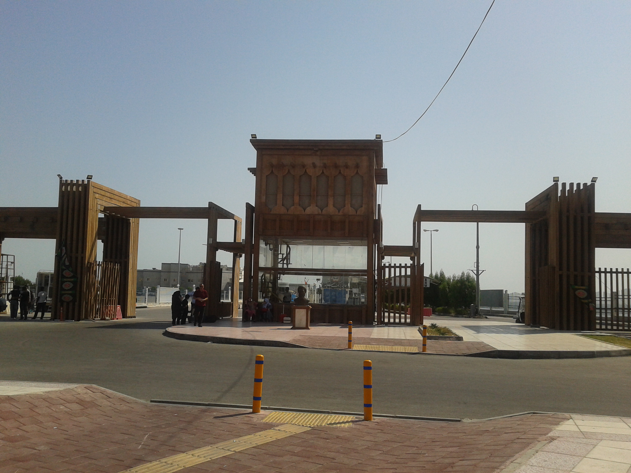 ورودی اسکله شهید حقانی بندرعباس - مهر ۱۳۹۸